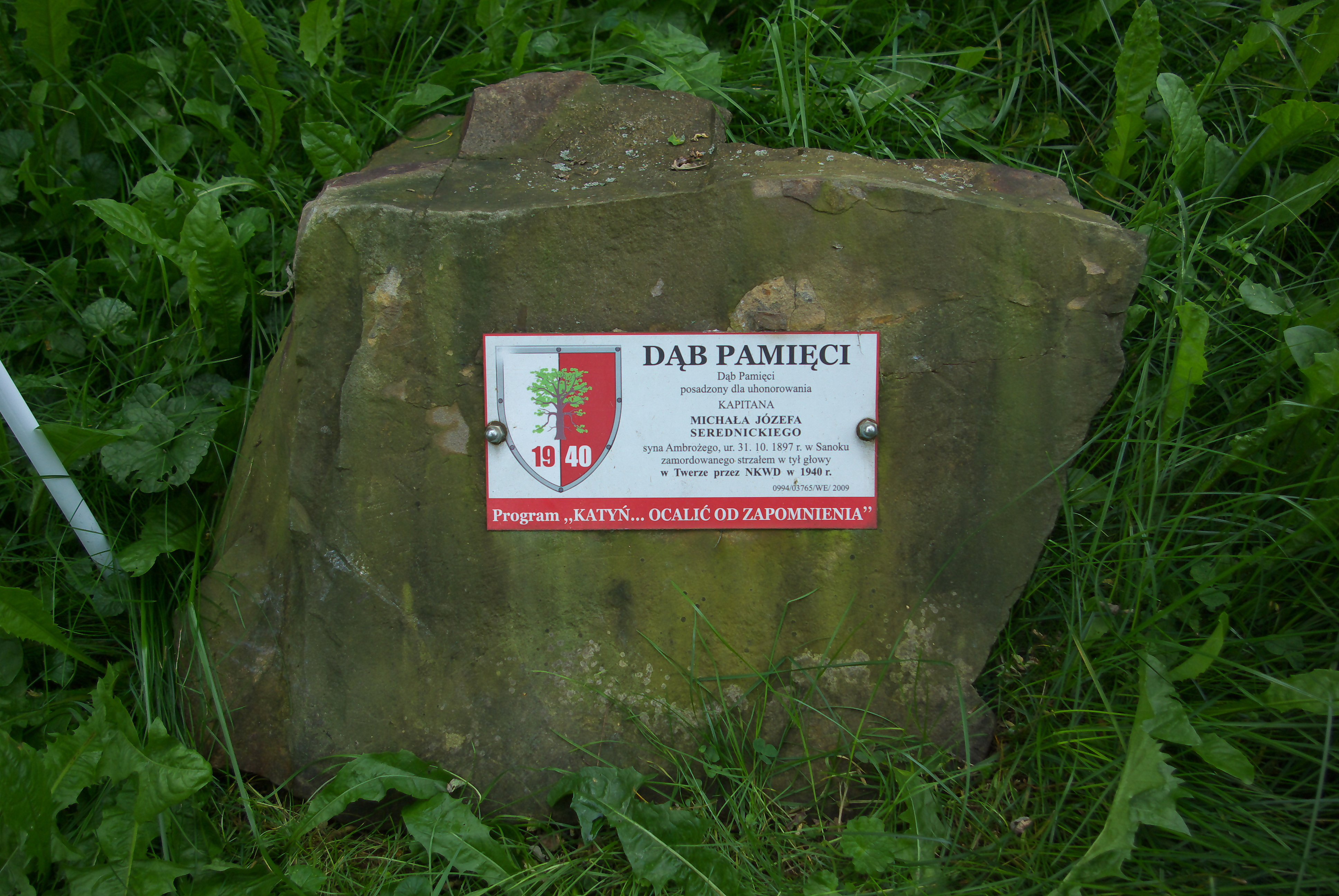 Dąb Pamięci honorujący Michała Serednickiego w Trepczy